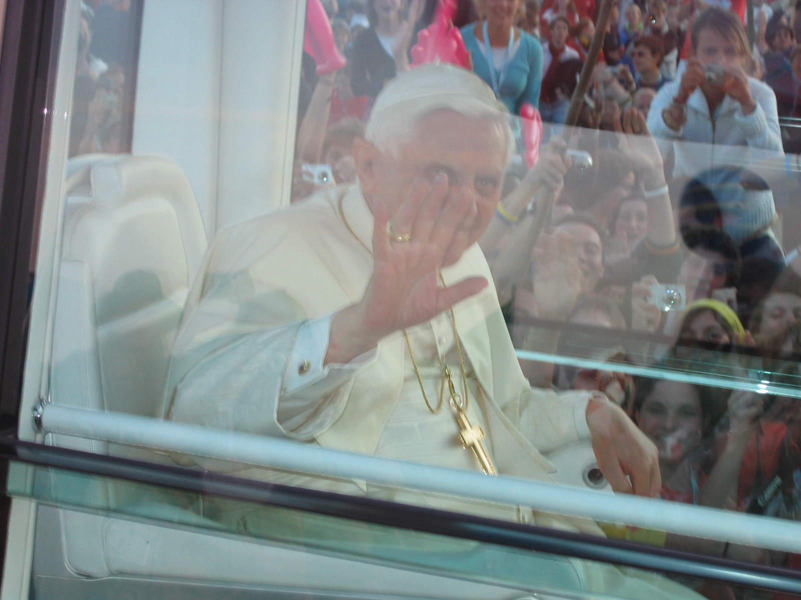 Benedicto XVI saluda desde el Papa móvil.